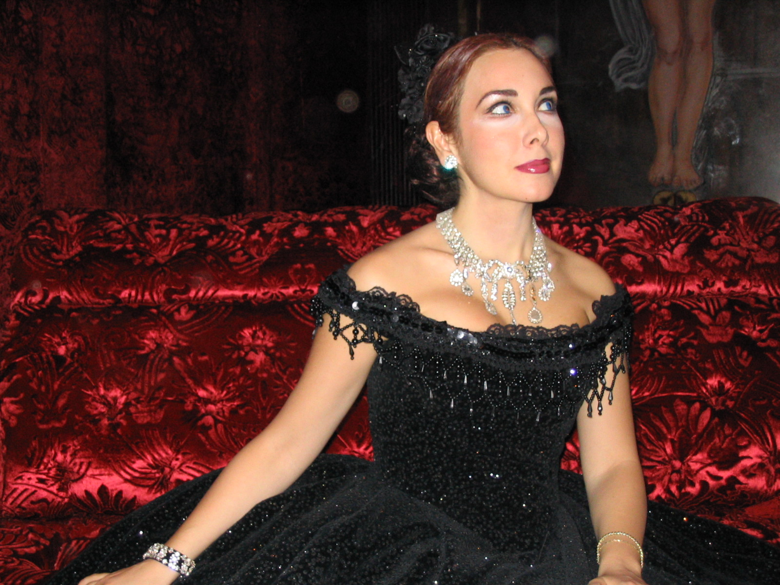 Violetta.